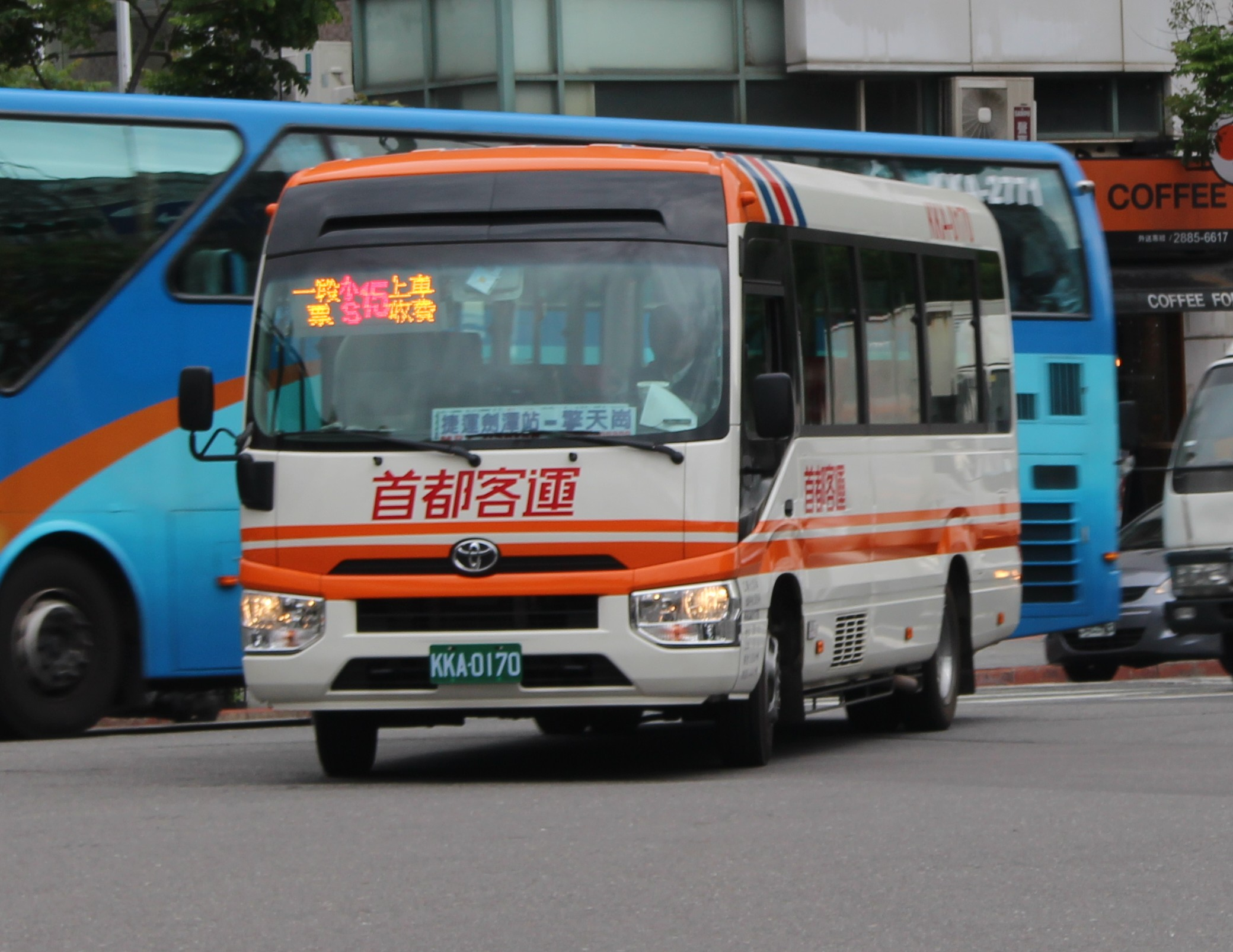 首都客運2019 TOYOTA COASTER XZB70L-ZEMSYR KKA-0170 S15